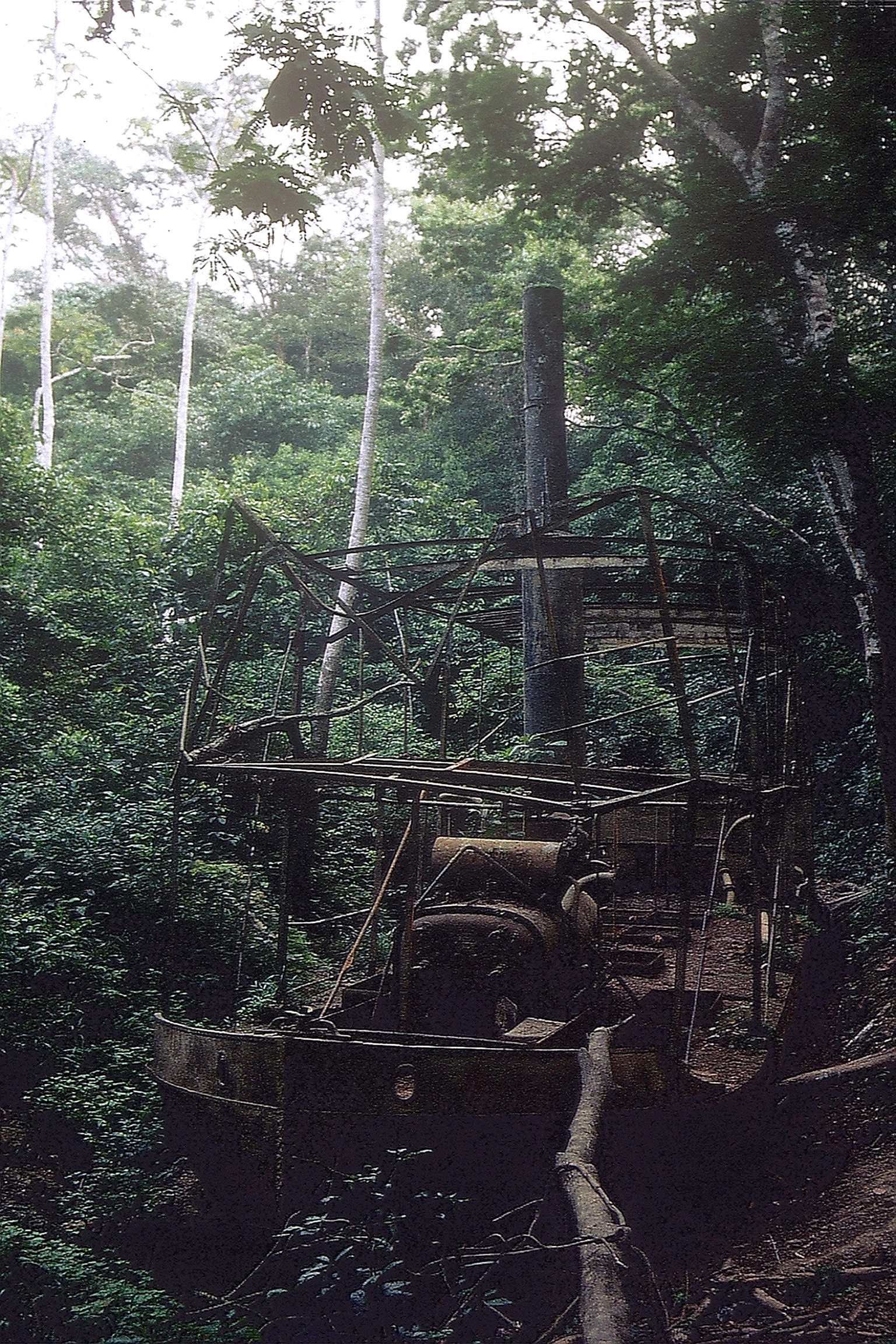 Der Flussdampfer aus dem Werner-Herzog-Film Fitzcarraldo mit Klaus Kinski führt heute ein Schattendasein im Dschungel in der Region Madre de Dios.